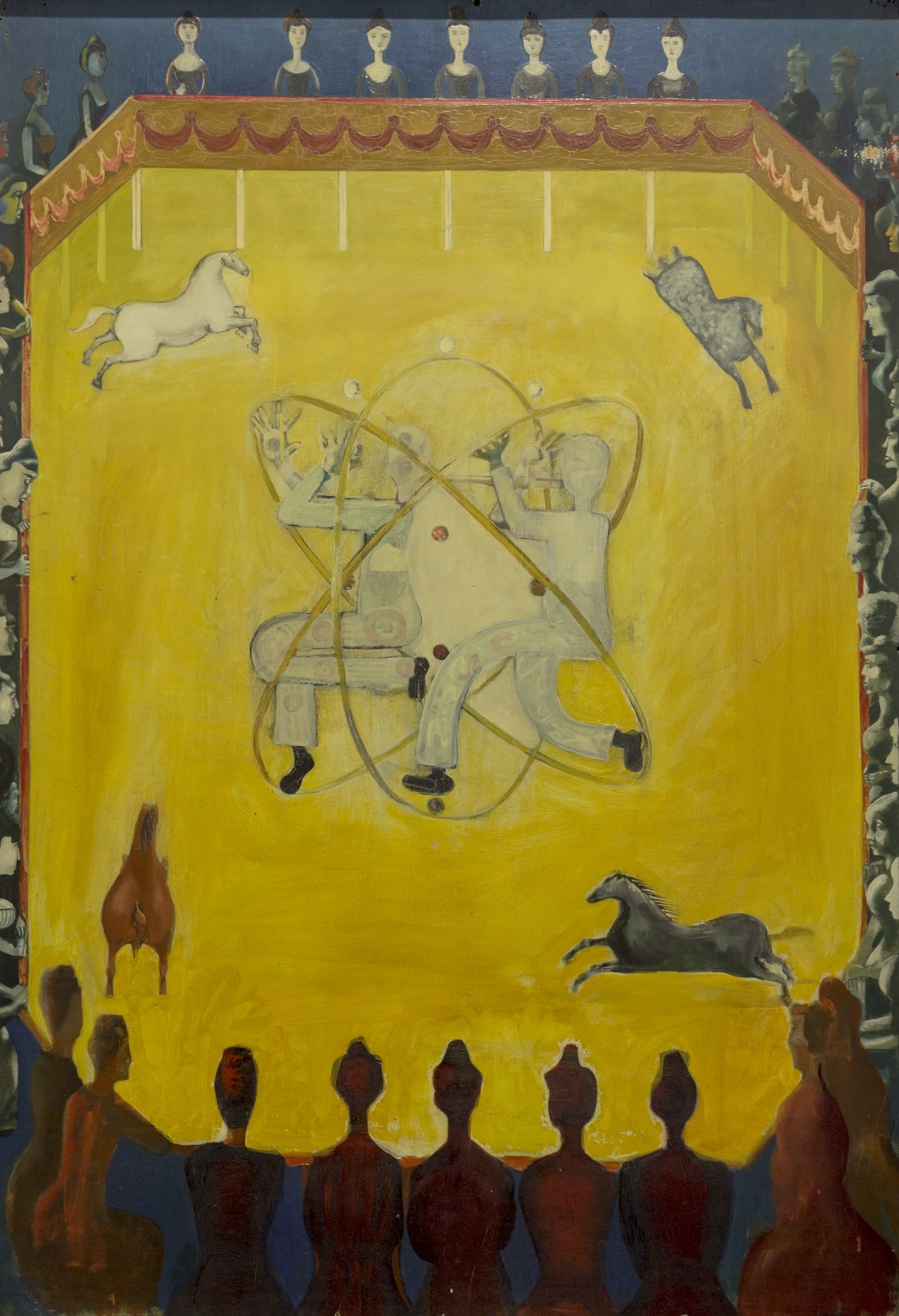 Le Cirque